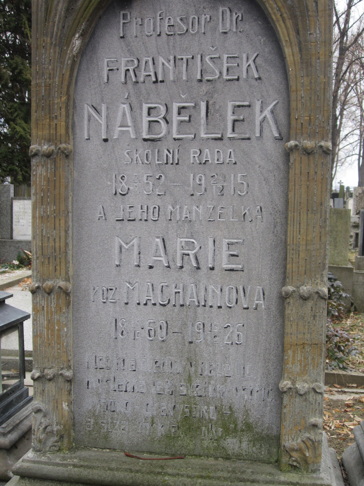 Náhrobek, na hřbitově v Kroměříži